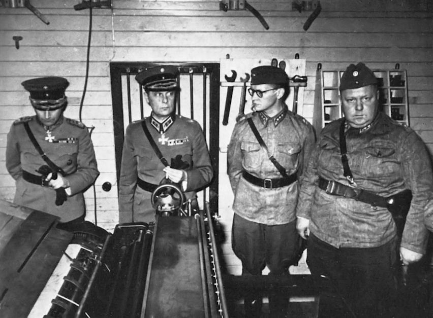 Mikkelin kirjapainojunan tarkastajat vassemmalta, kenraalimajuri Edvard Hanel, kenraalimajuri W. E. Tuompo, kapteeni Lehmus ja everstiluutnantti Kurt Bruncrona.